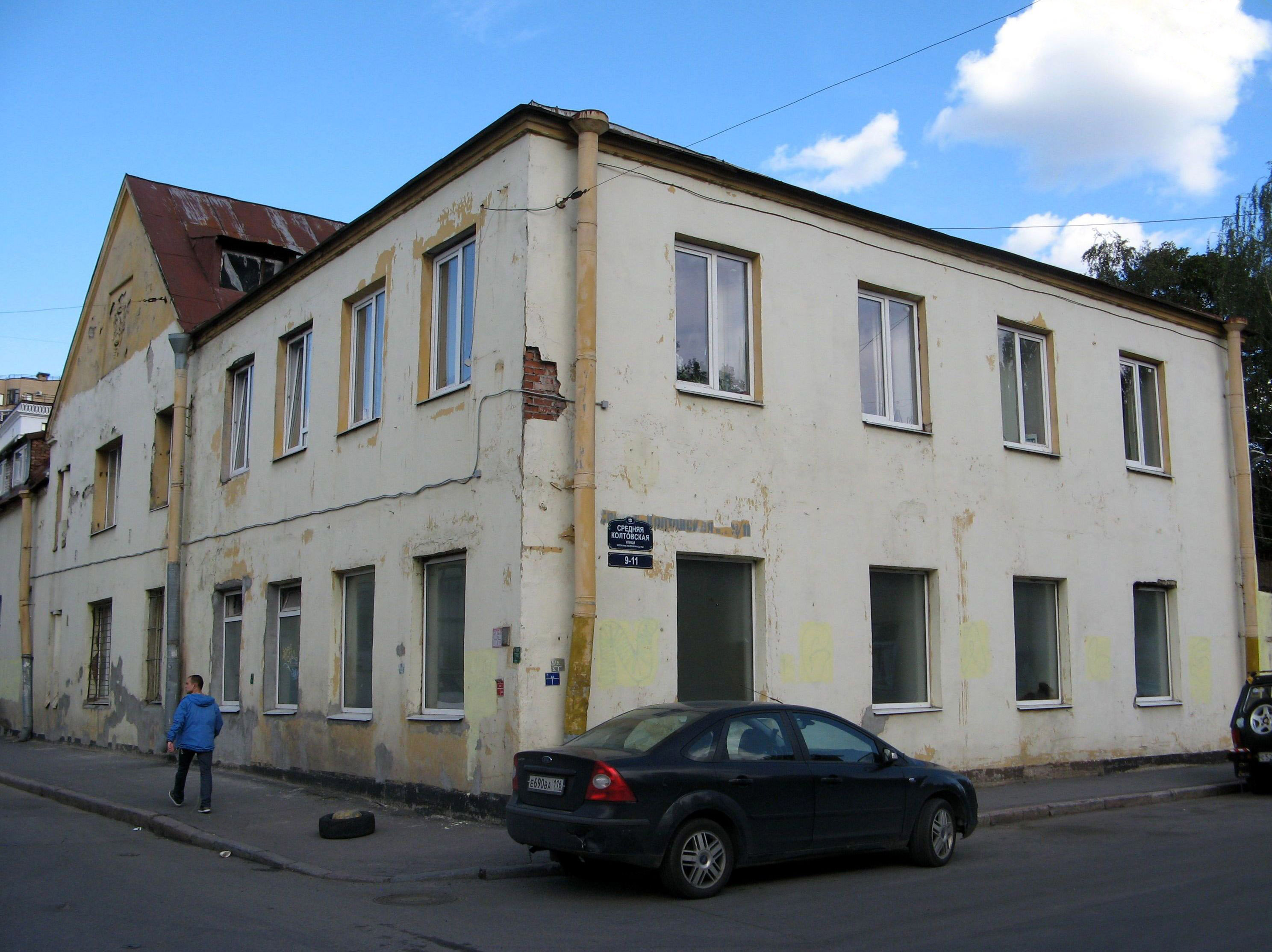 Санкт-Петербург, Средняя Колтовская улица, д. 9-11 (угол Петергофской улицы)